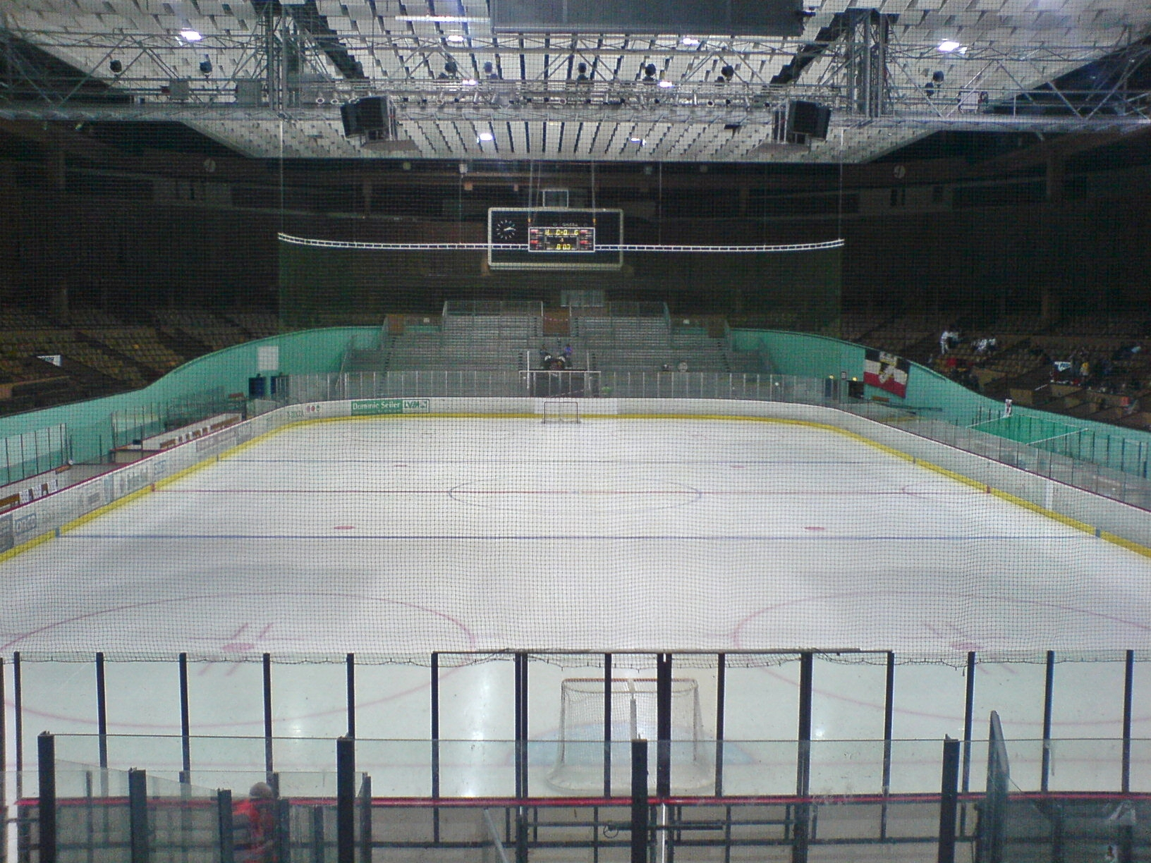 Berliner Deutschlandhalle von innen